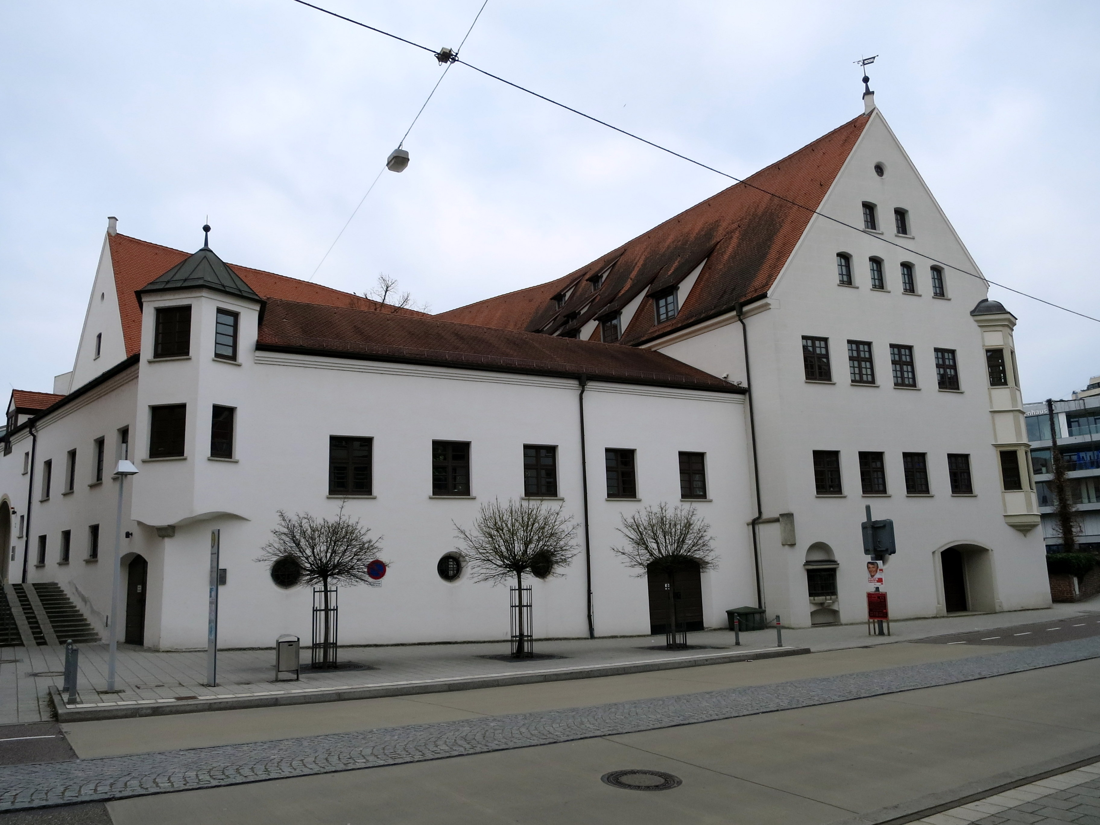 Nordseite